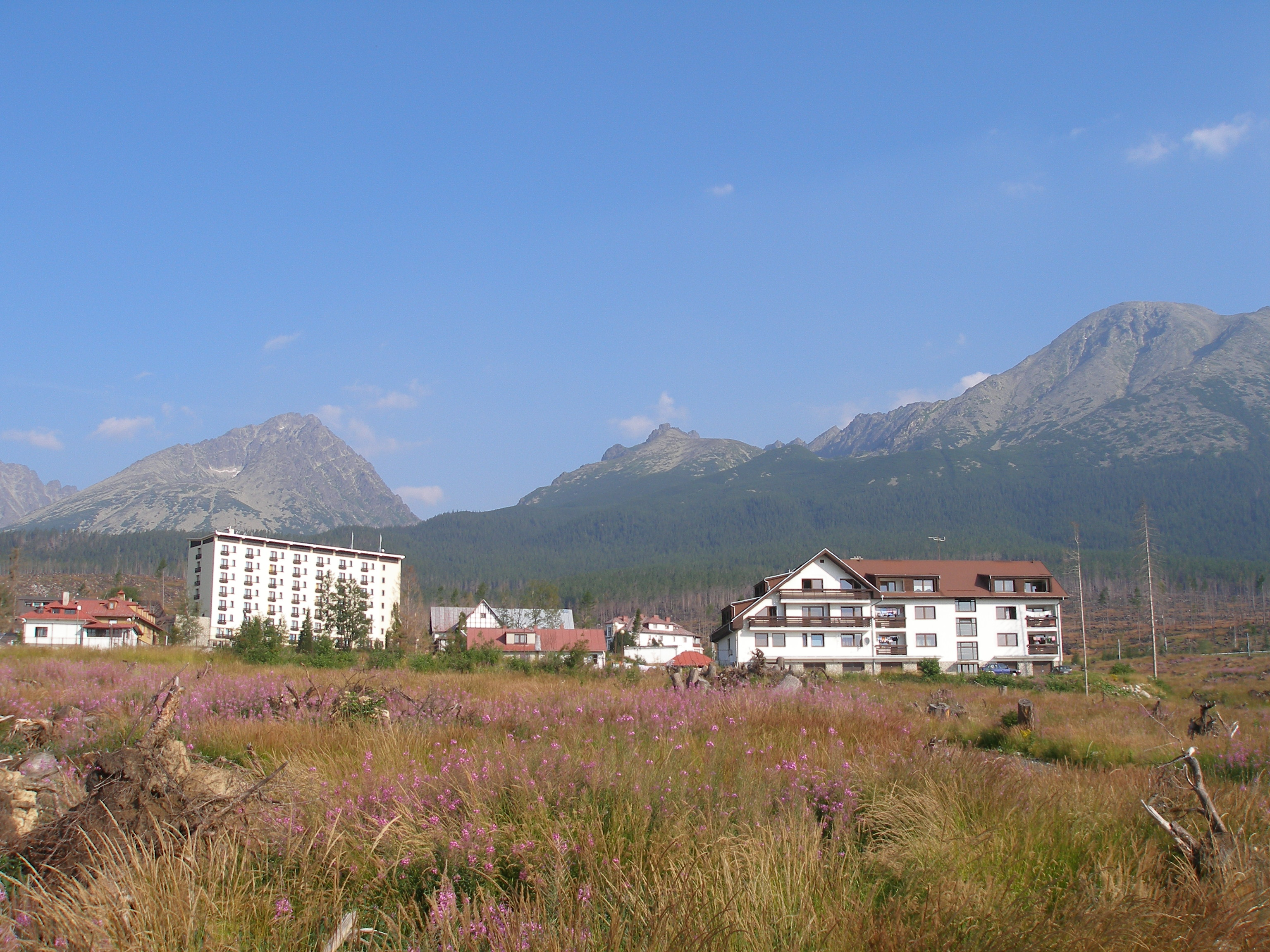 Osada Tatranské Zruby, Vysoké Tatry, Slovakia